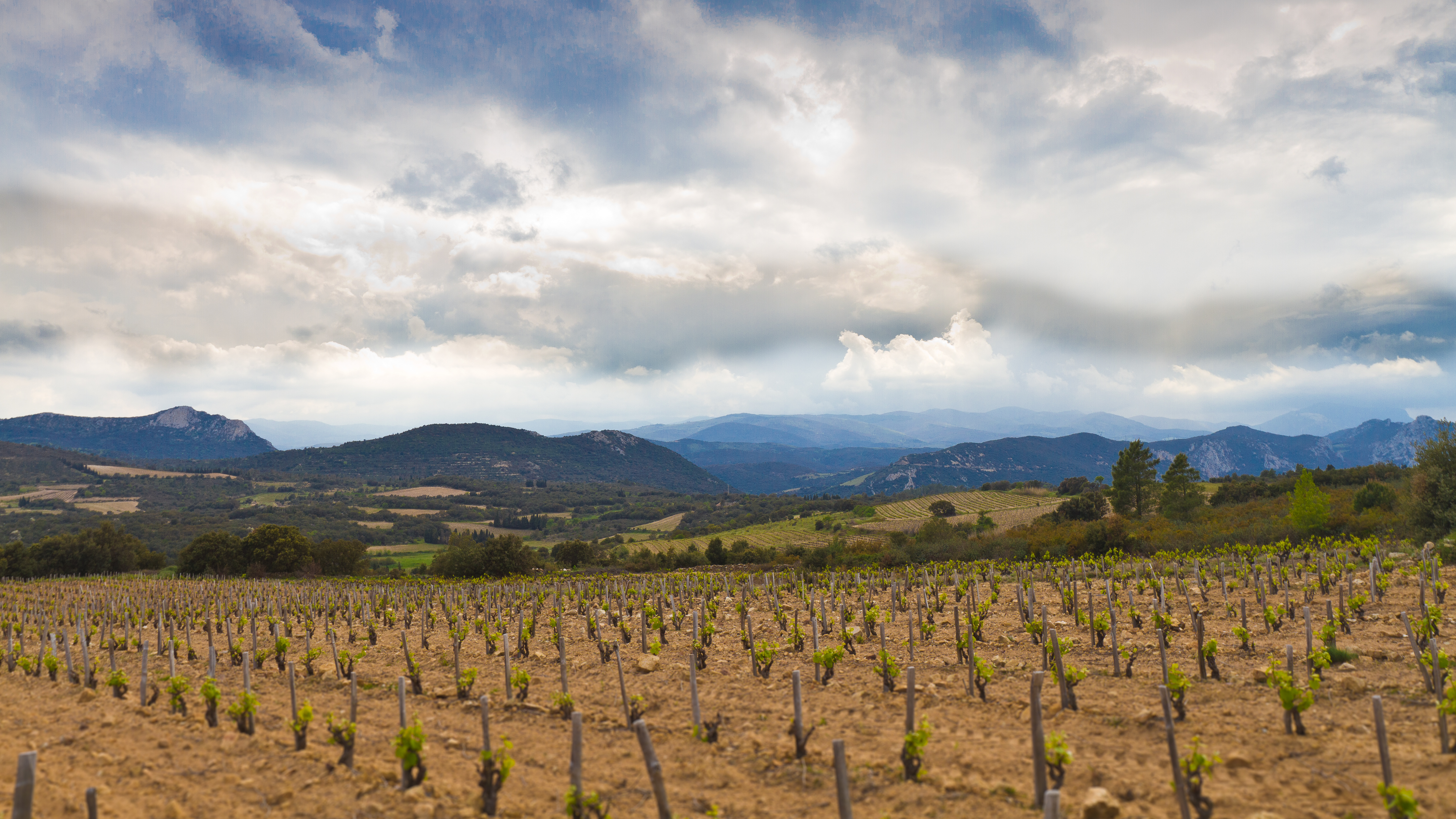 Vignoble de Lesquerde côtes-du-roussillon villages